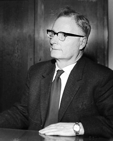 Folkets Hus, interiør, kontor, menn2, kvinne.